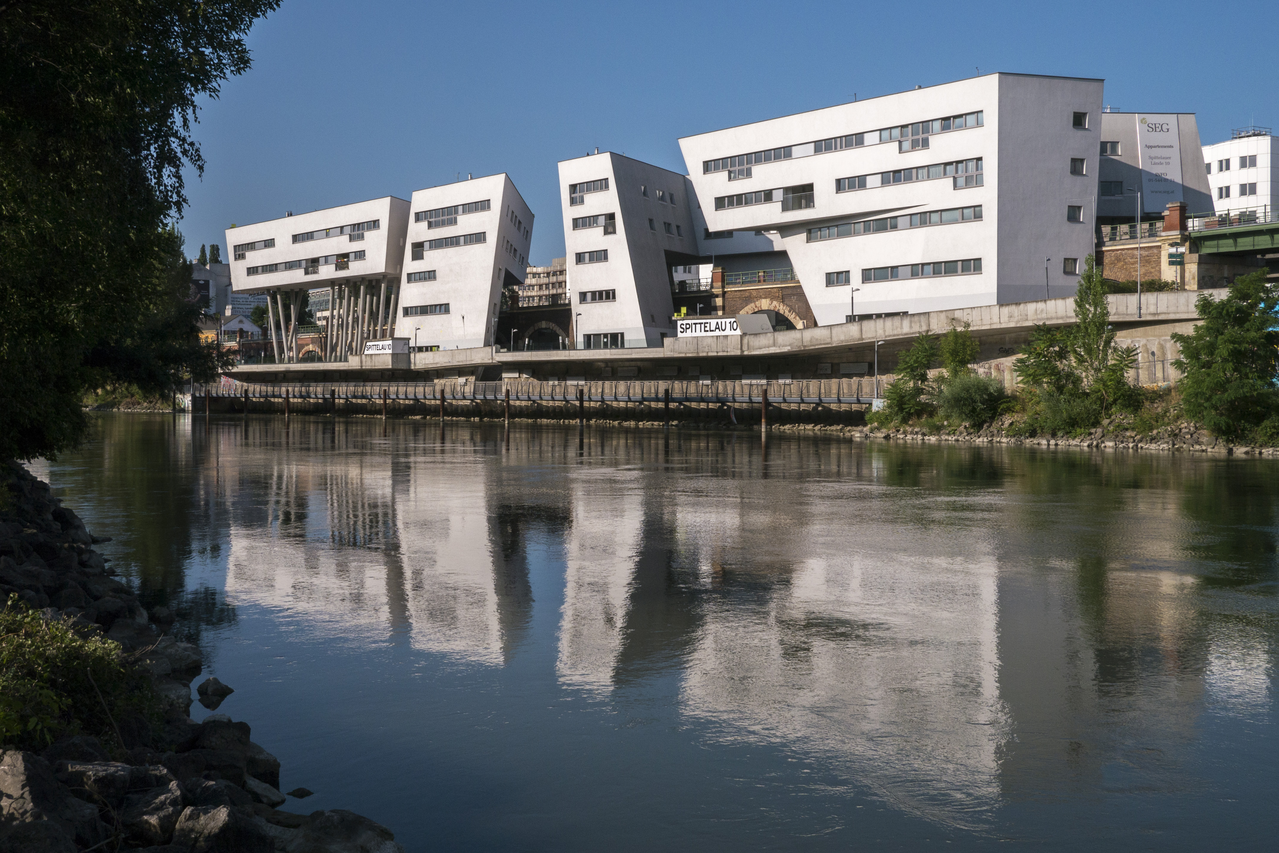 Donaukanal Zahahadidhäuser